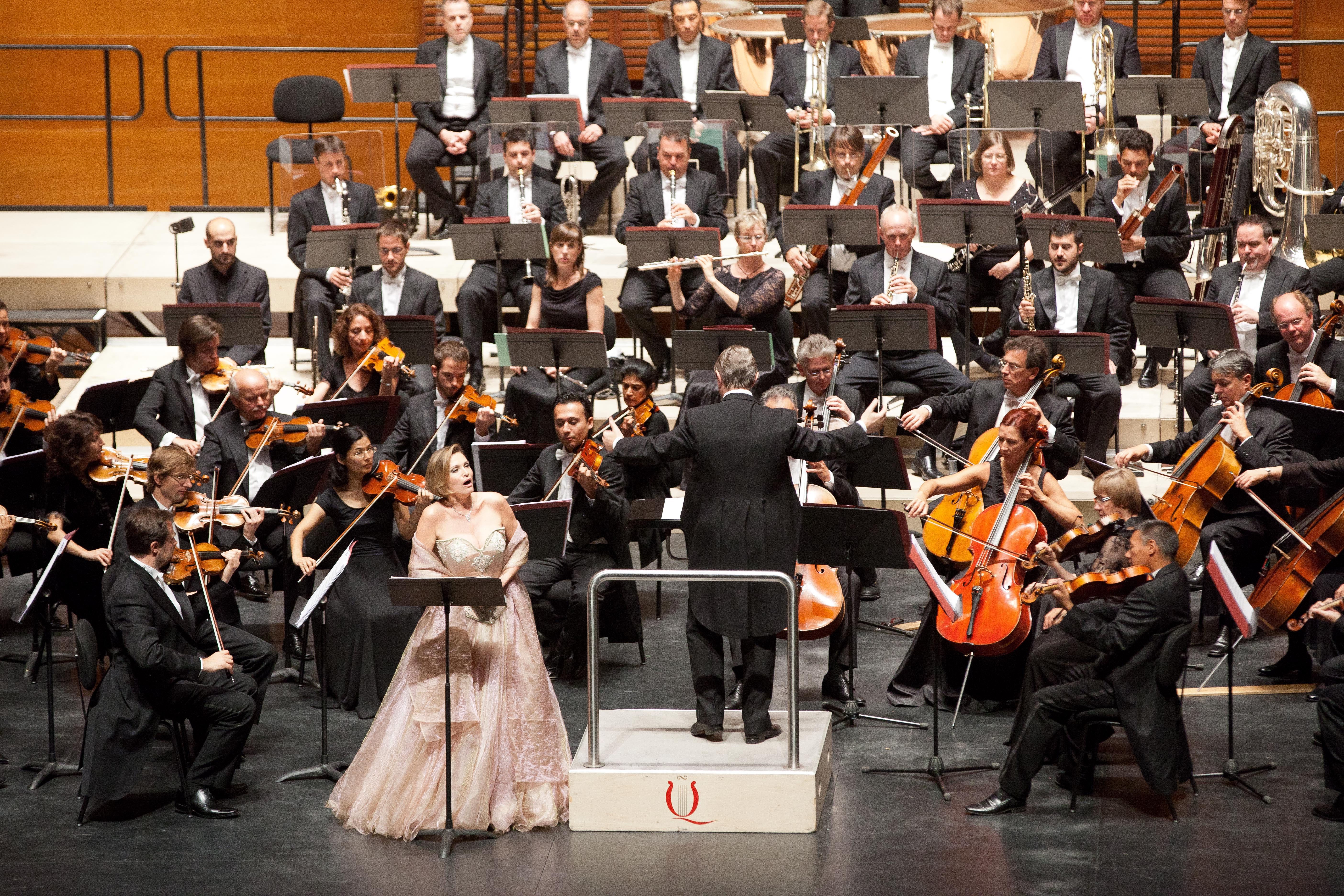 Orquesta Sinfónica de Galicia-Ainhoa Arteta